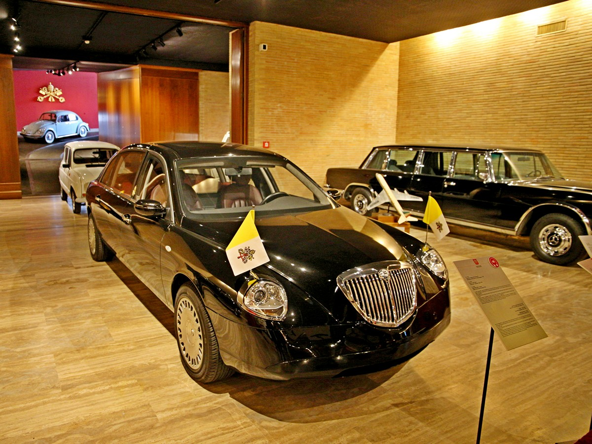 Lancia Thesis als Papamobil in den Vatikanischen Museen